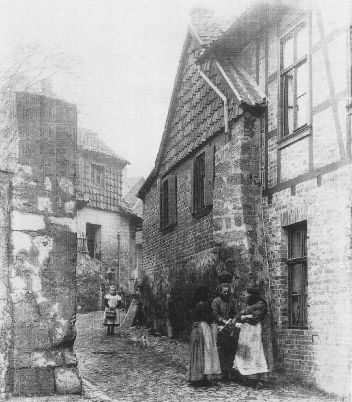 Münzenberg, Zugang von Westen bei Haus Nummer 36, Quedlinburg um 1900